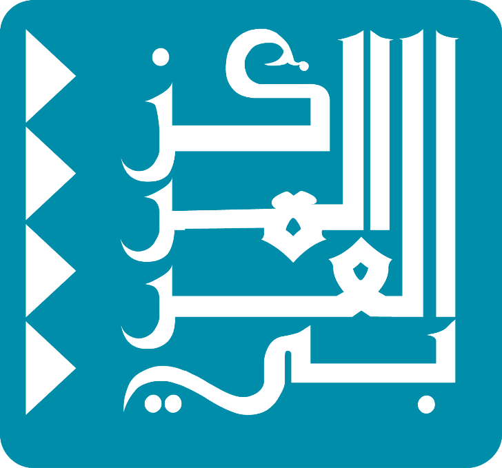 لوجو المركز العربي للأبحاث ودراسة السياسات